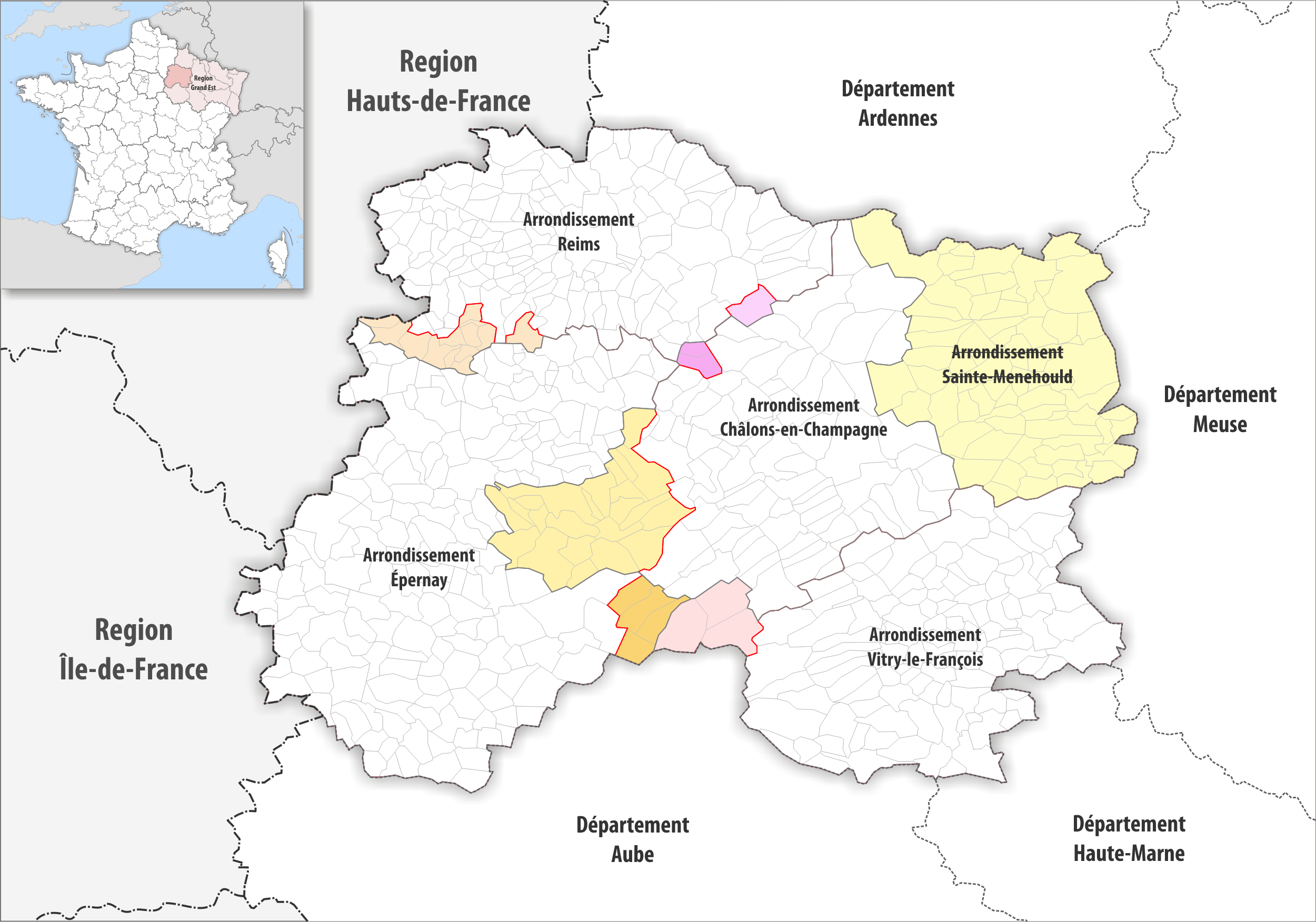 Arrondissements Anpassungen auf 2017 im Departement Marne